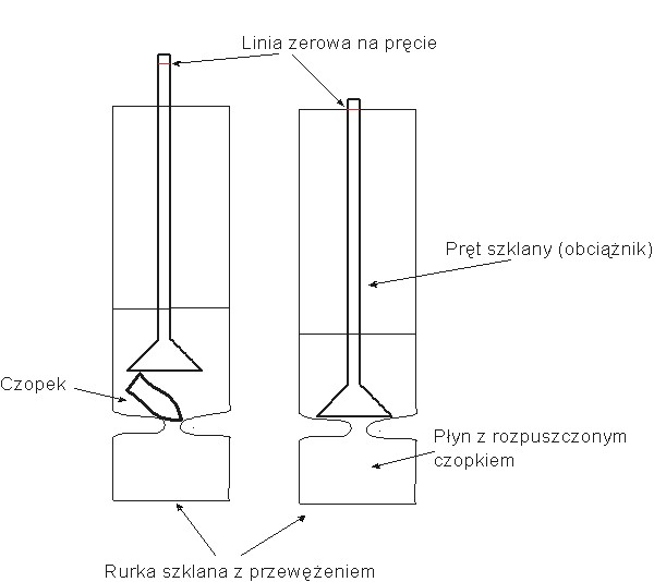 shcemat aparatu do badania czasu deformacji czopków